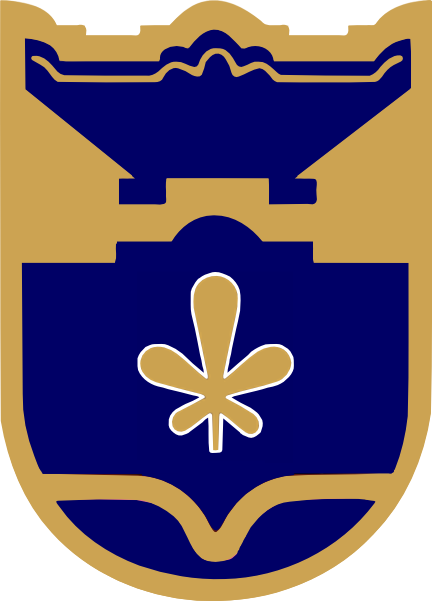 Srpski (latinica): Propali predlog za grb Banje Luke